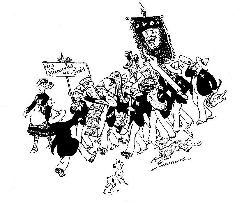 Sur la planche "Train de plaisir", caricature d'un ensemble de bigophones.